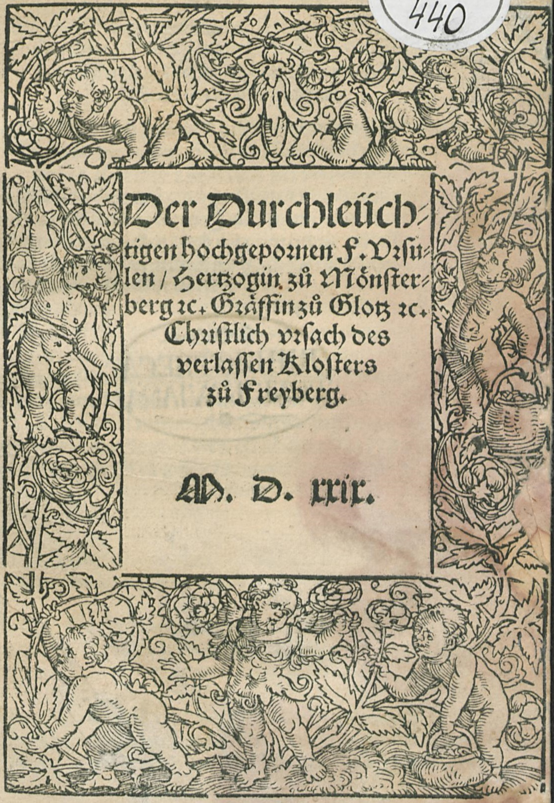 Ursula von Münsterberg, Christlich vrsach des verlassen Klosters zů Freyberg, Nurnberg (Georg Wachter) 1529, Titelseite